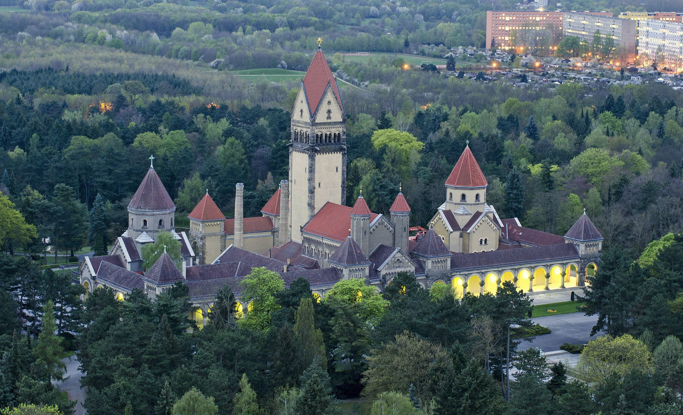 Kapellenanlage, Krematorium und Kolumbarium.